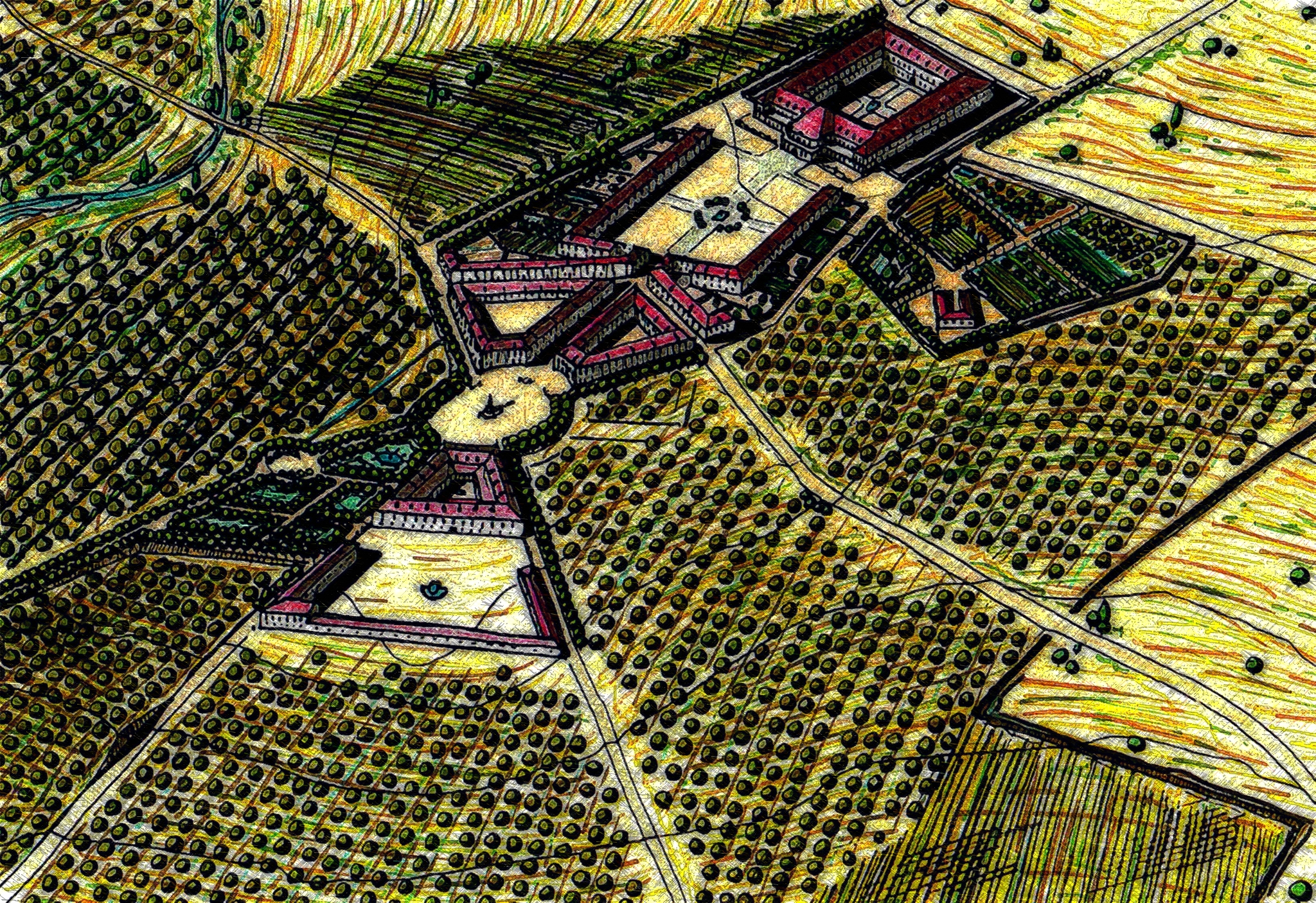 Dibujo a lápiz coloreado con rotulador a color y lápices de madera, tratado digitalmente.